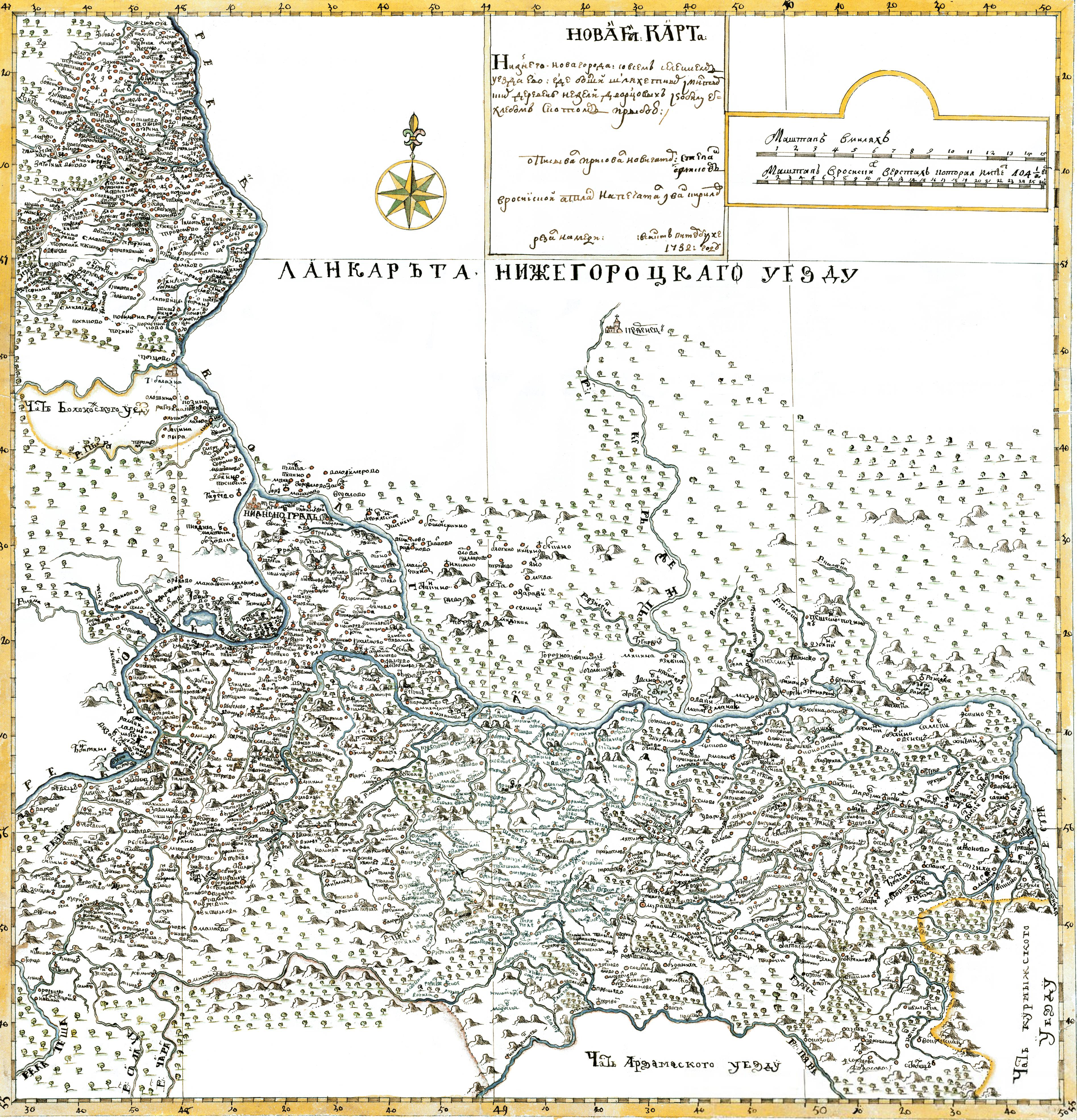 Нижегородский уезд. «Атлас Всероссийской империи» И. К. Кириллова. 1722-1737 гг.